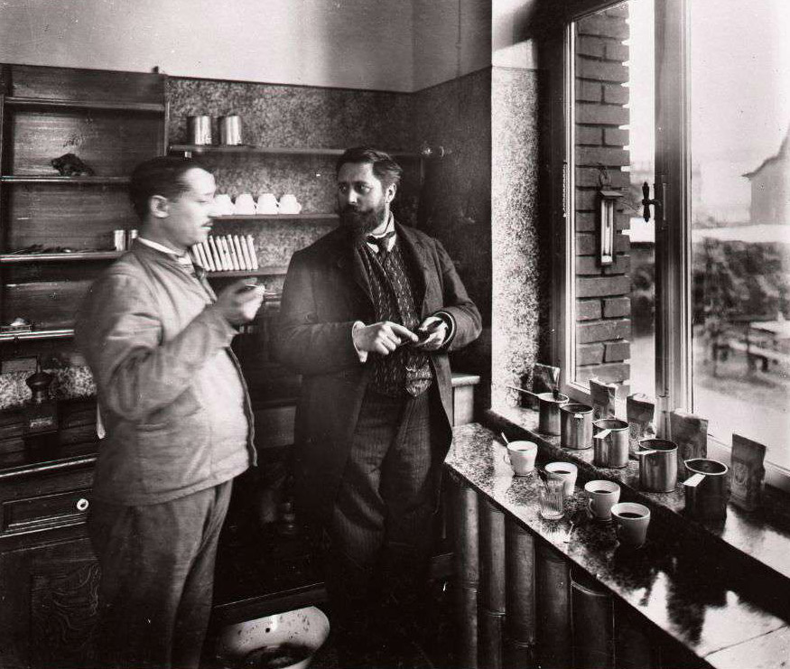 Malzkaffeeprobe in der Kathreiner Malzkaffee-Fabrik.